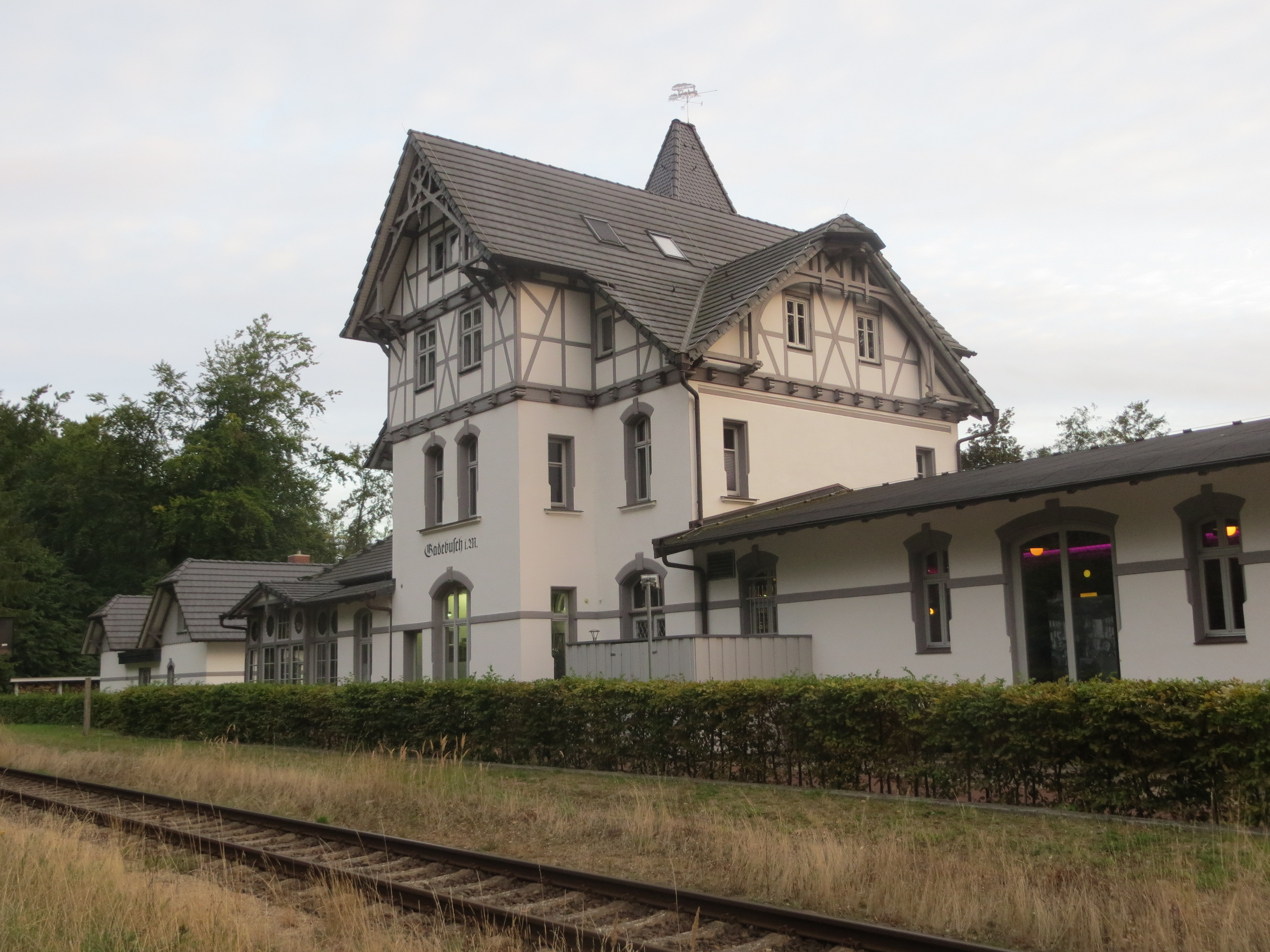 Bahnhof in Gadebusch